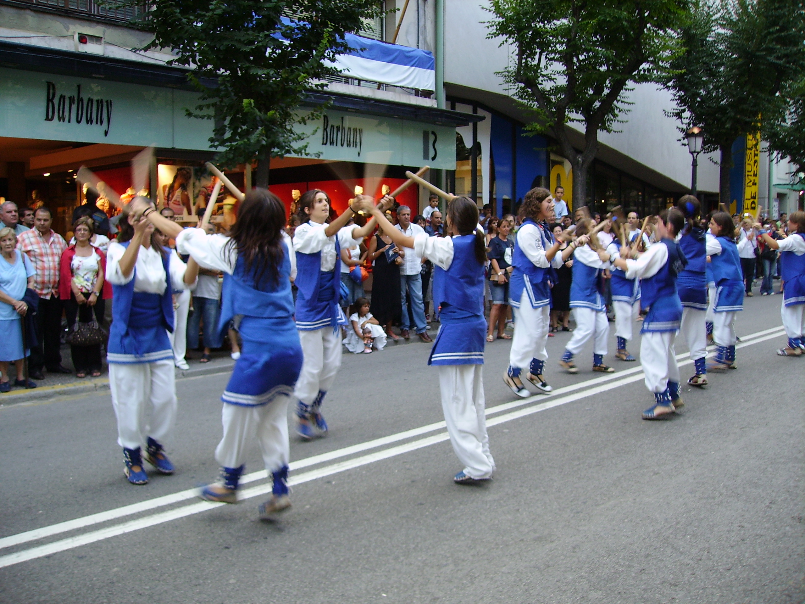 Ball de Bastons a la Festa Major de Granollers.